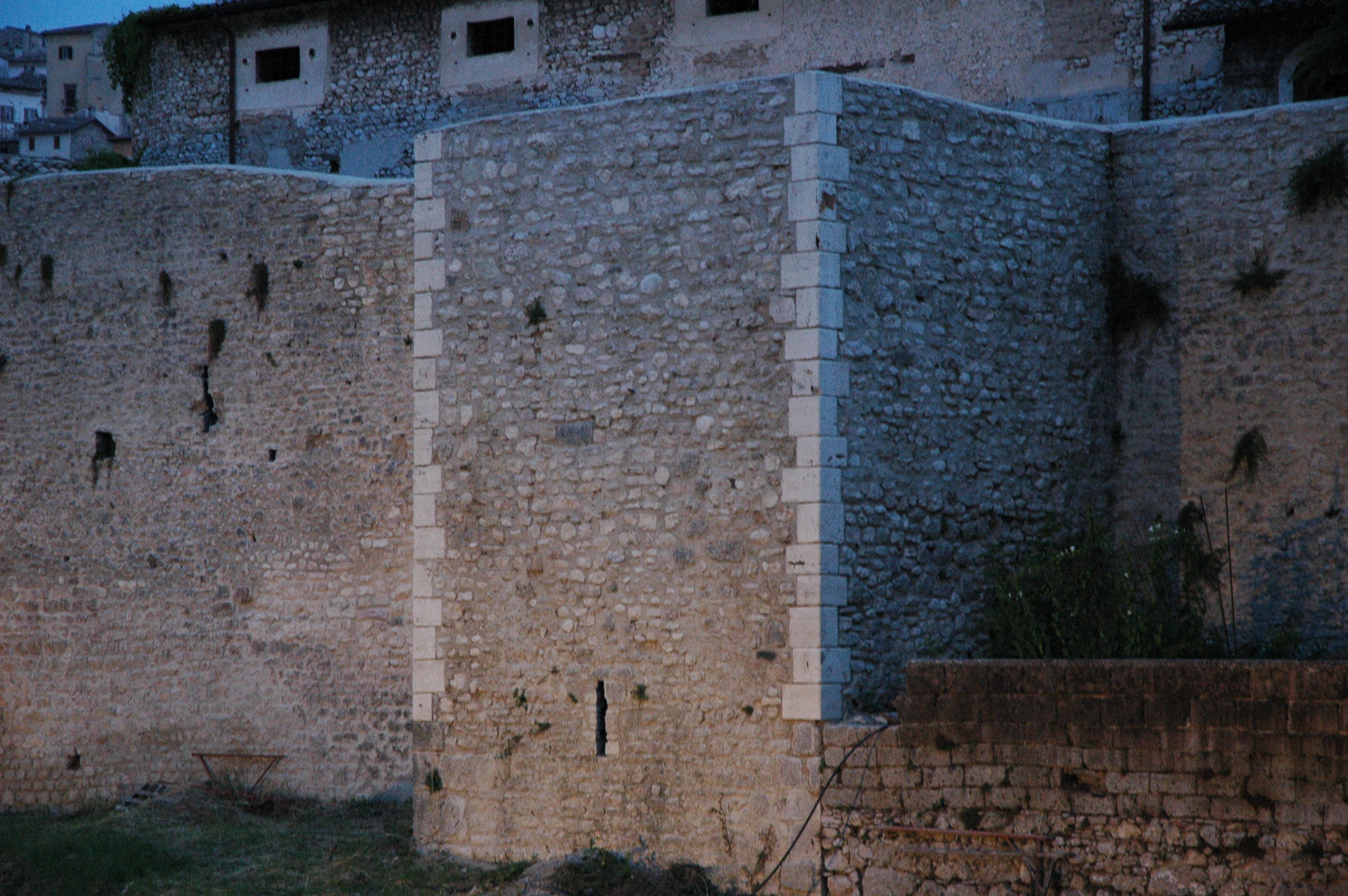 Tratto di Mura medioevali lungo Via Cacciatori delle Alpi